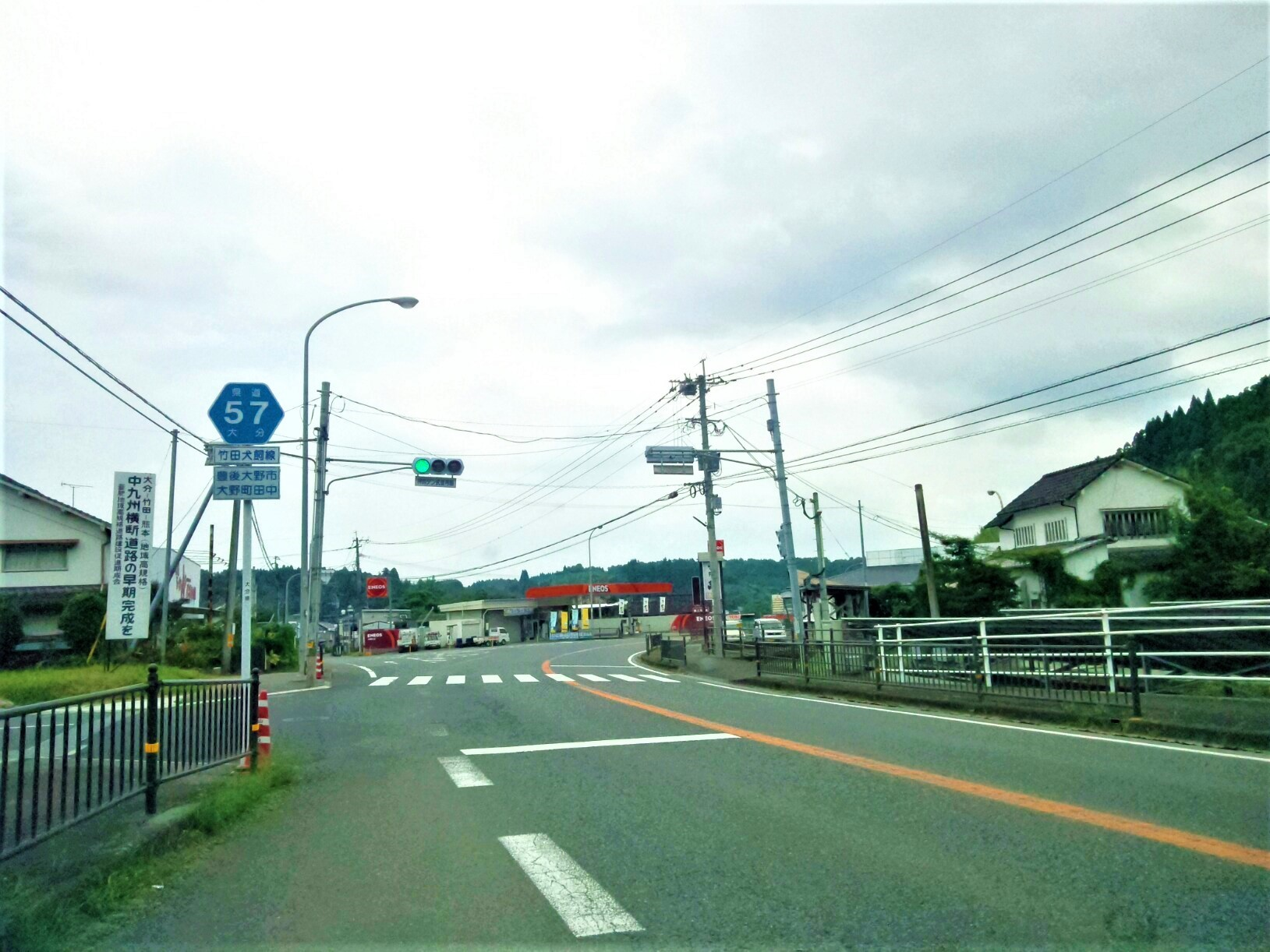 大分県道57号、豊後大野市大野町にて